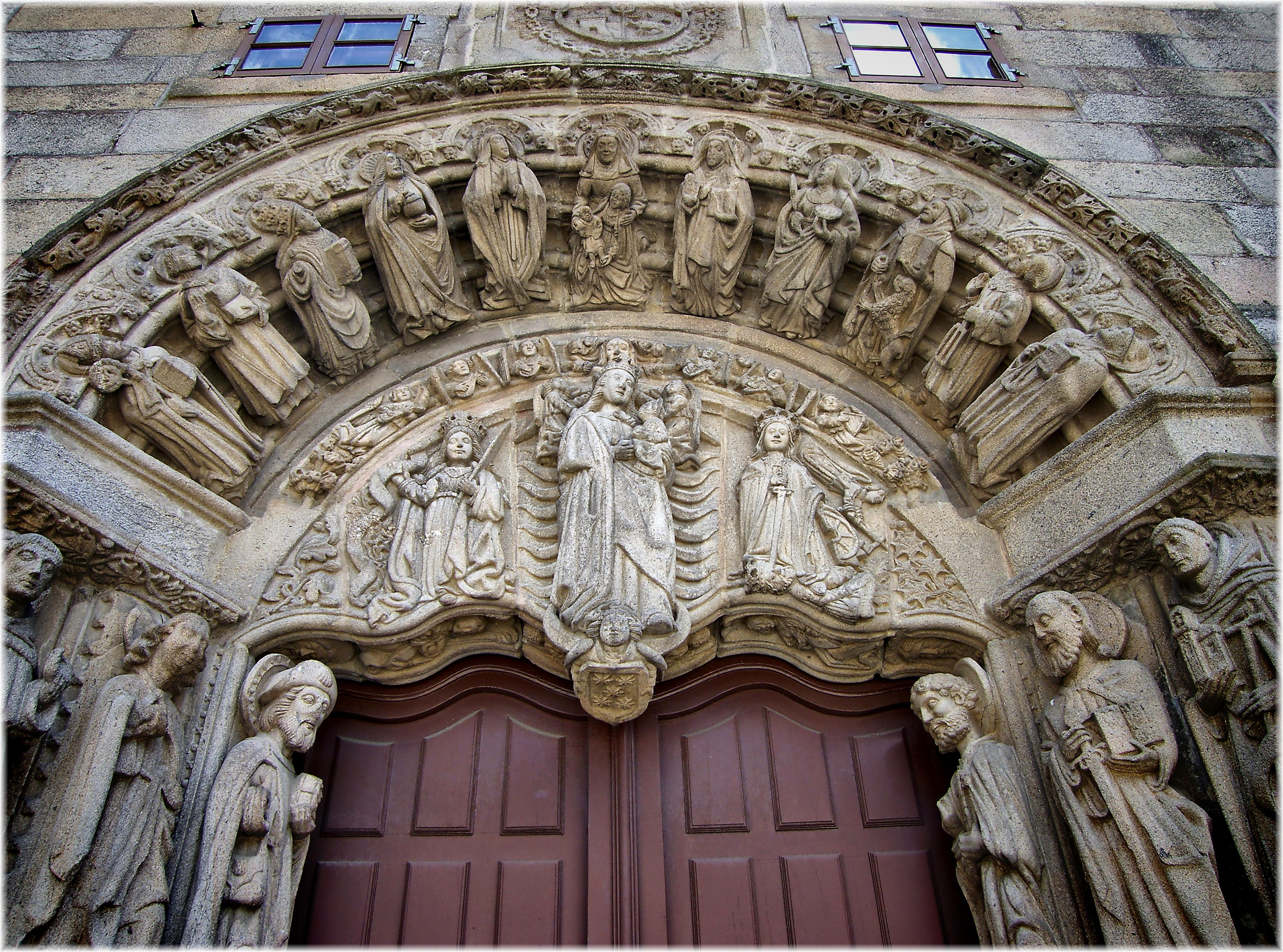 O Colexio de San Xerome, dito tamén Colexio de Artistas, é un edificio civil de Santiago de Compostela, sito no lado meridional da praza do Obradoiro, cerrándoa por ese lado. Durante boa parte do século XX, foi sede da Escola Normal de Maxisterio. Desde os anos 1980, e xunto co pazo de Fonseca, alberga o Reitorado da Universidade de Santiago. Na Galipedia, a Wikipedia en galego.